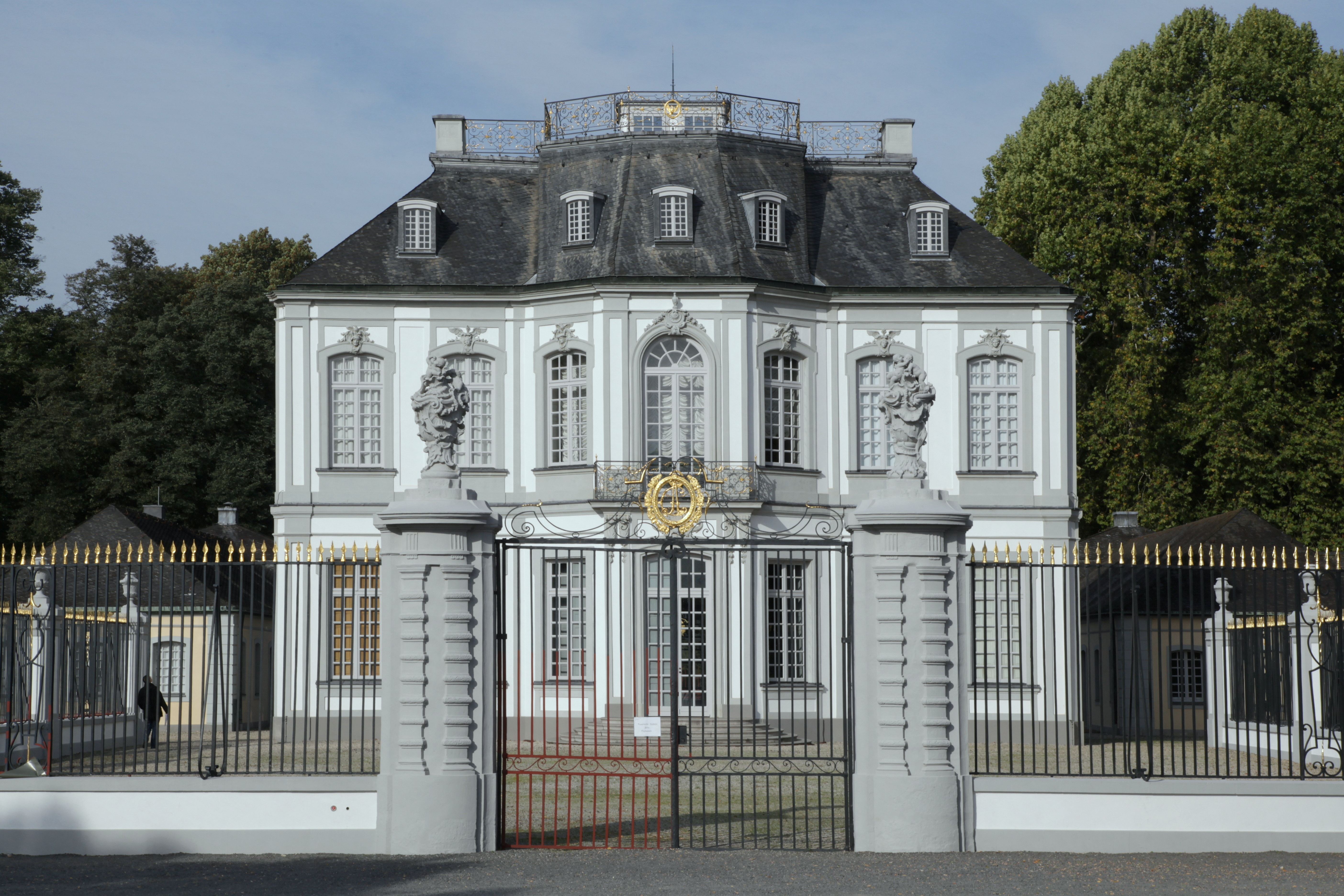 Schloss Falkenlust in Brühl (Rheinland)